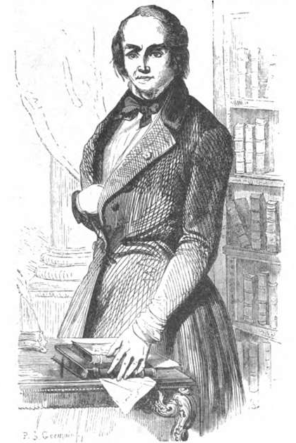 Casimir Delavigne.